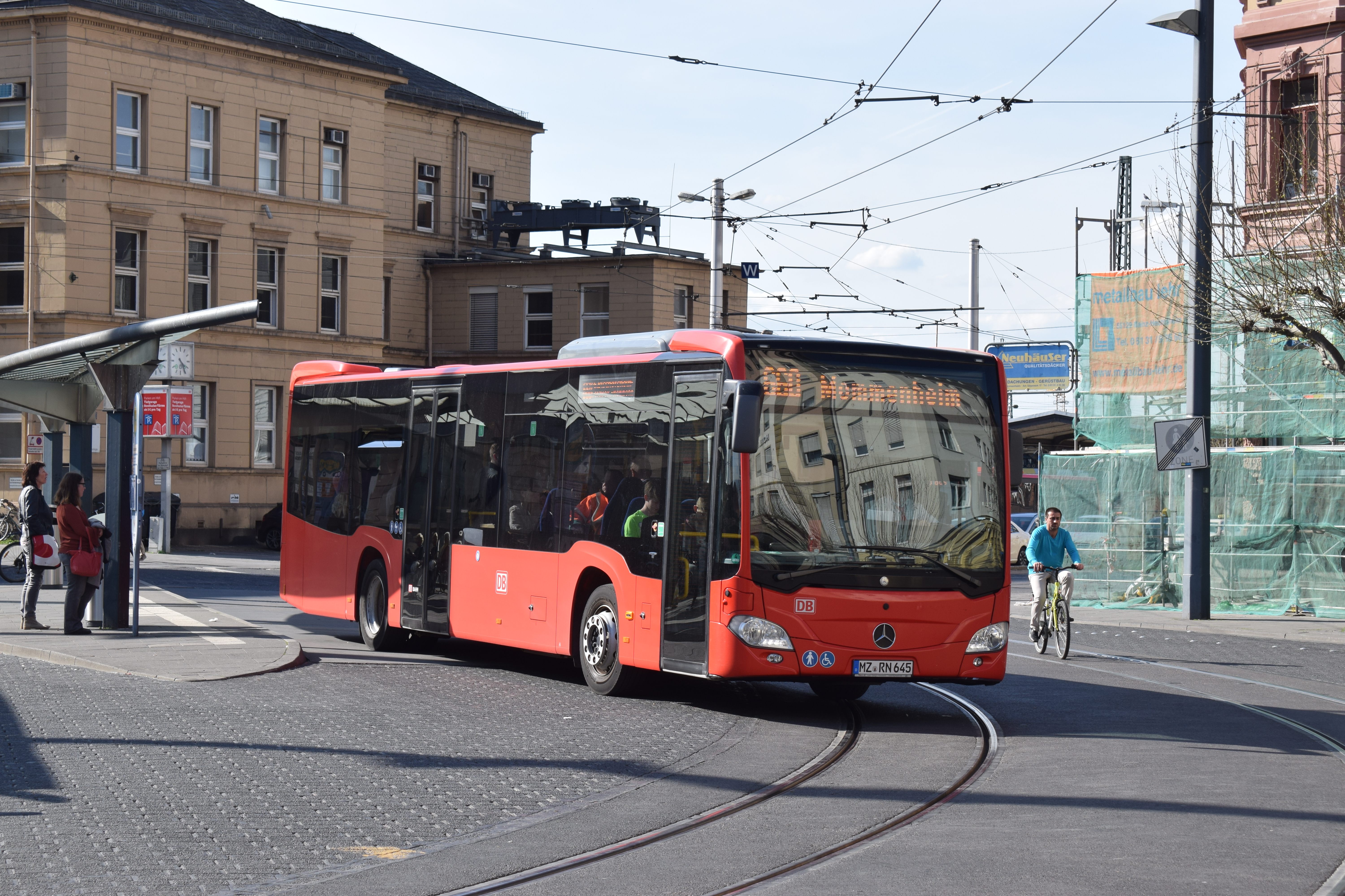 Citaro Ü der ORN Omnibusverkehr Rhein-Nahe GmbH am Mainzer Hauptbahnhof